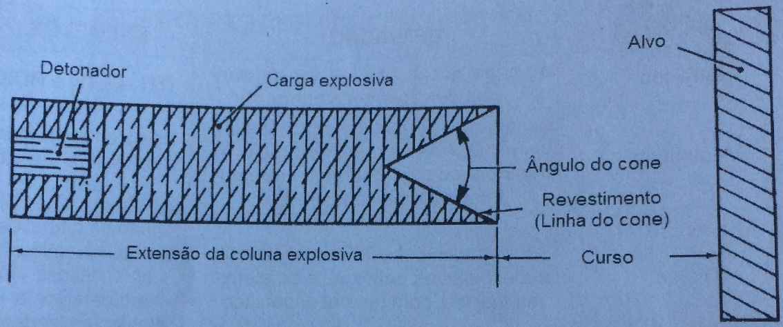 efeito monroe